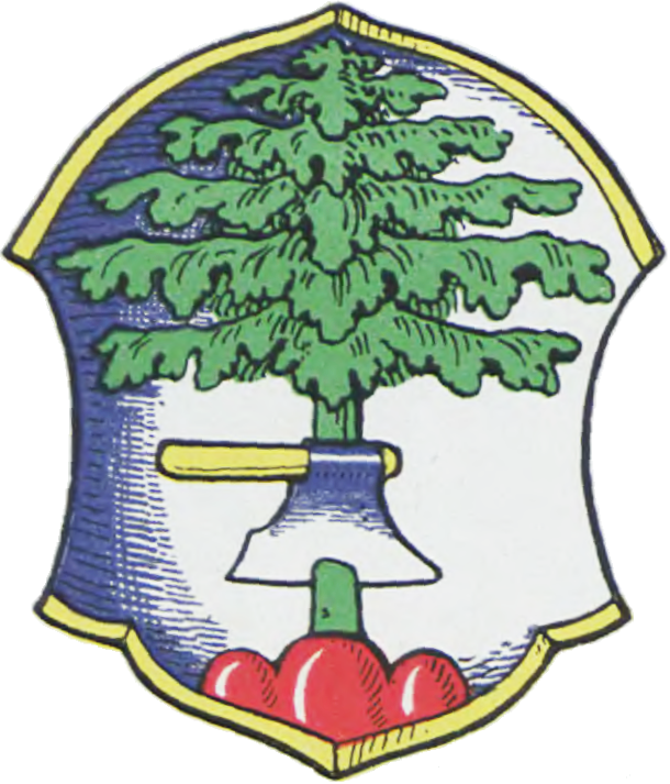 Wappen der Gemeinde Fichtenrode, Schlesien